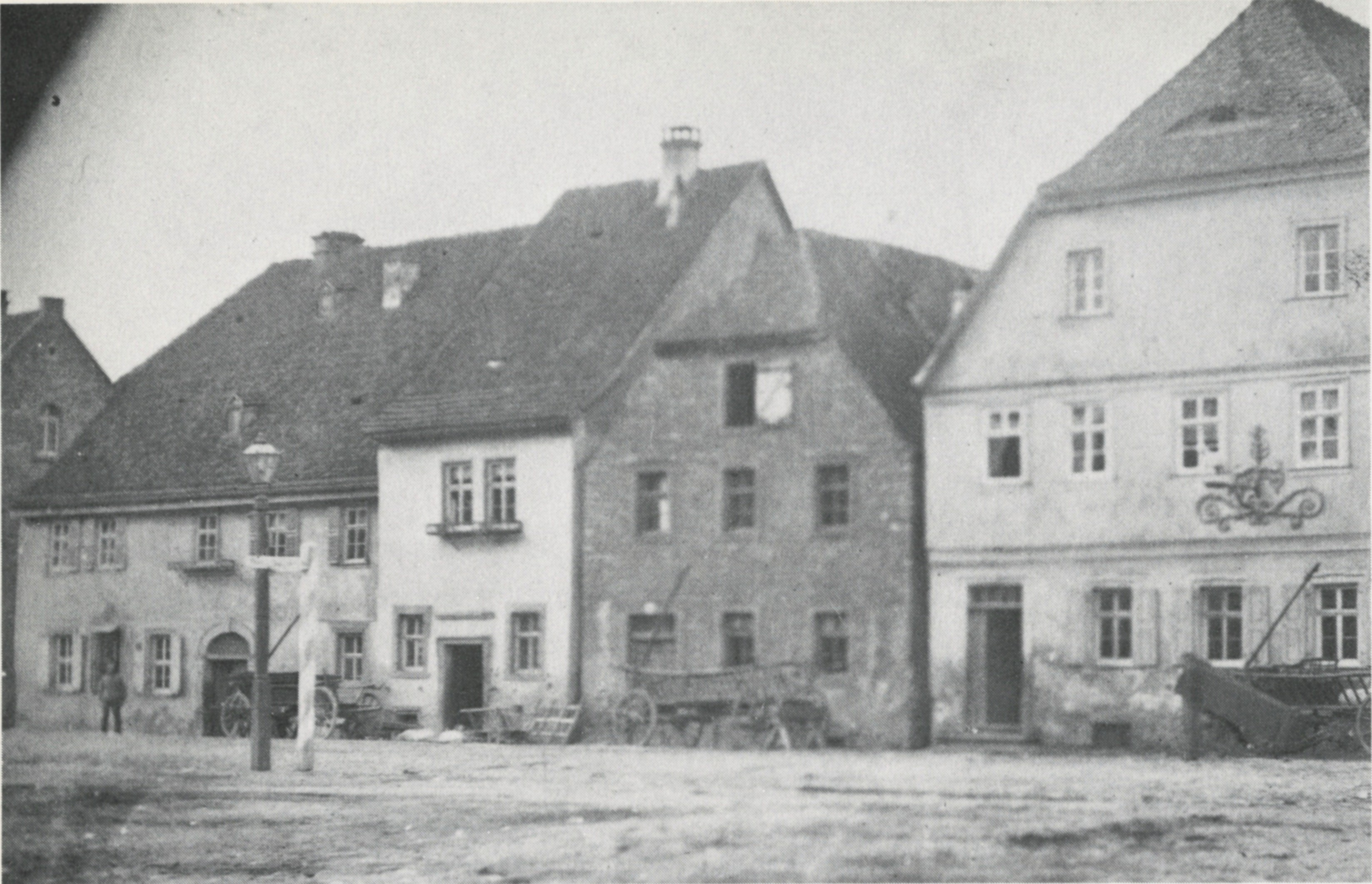 Fotografie der Oberen Vorstadt in Volkach, die Westecke des Saumarktes (heute Hausnummern Oberer Markt 8 bis 11) mit Gasthof Zum Lamm im 19. Jahrhundert.